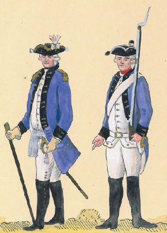 69. 1 Regiment Pieszy Buławy Polnej Litewskiej